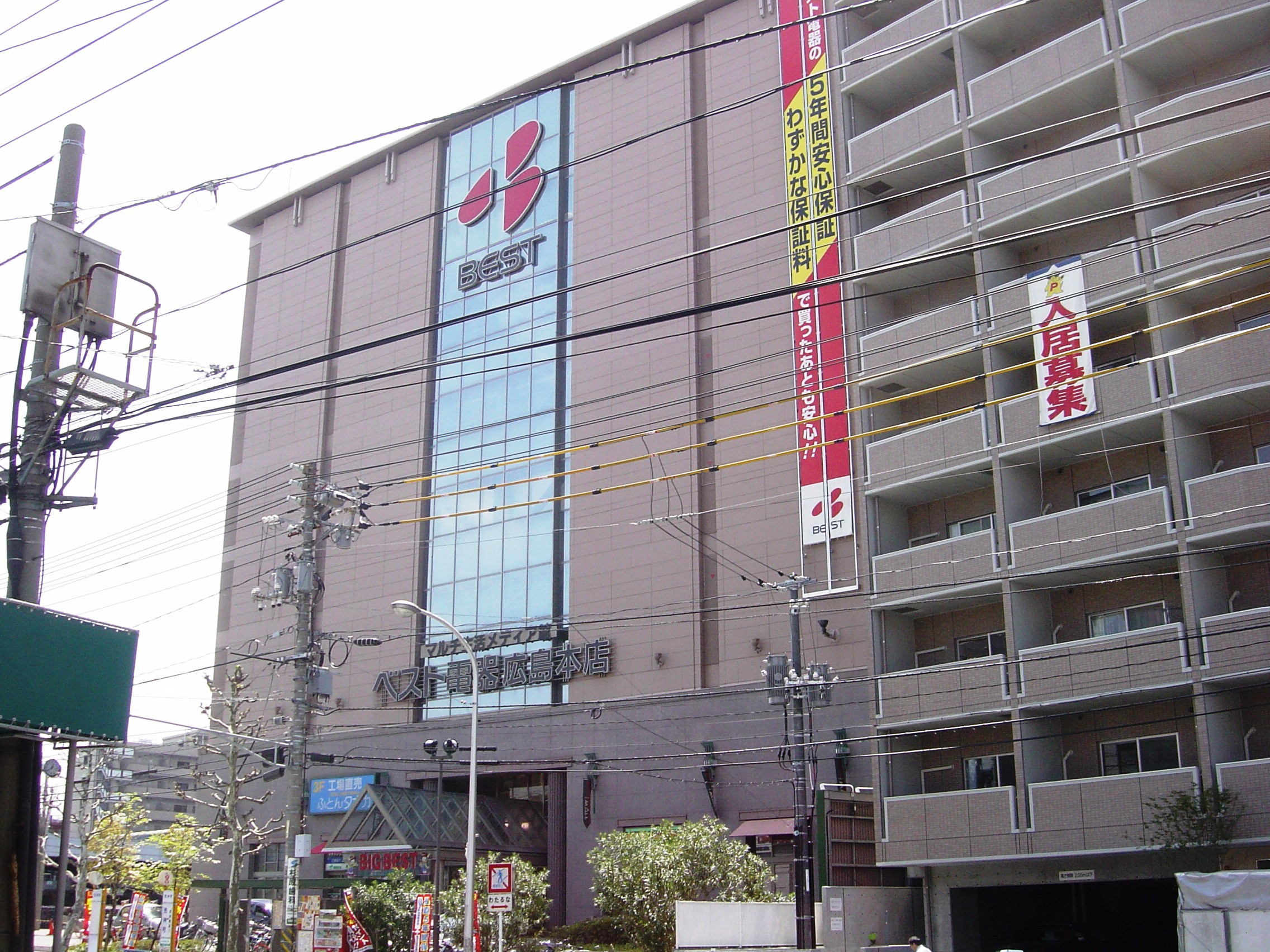 ベスト電器広島本店